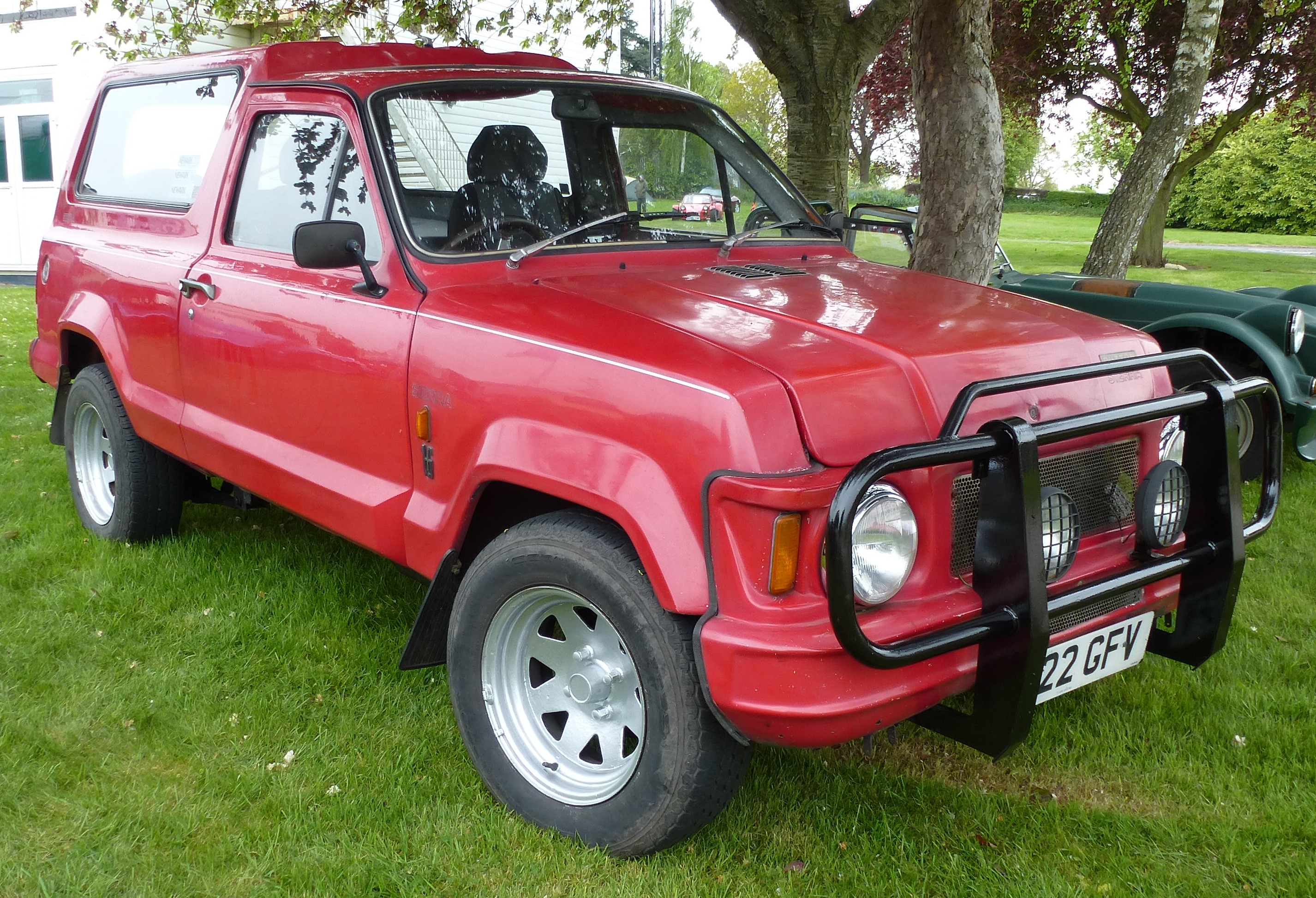 Dutton Sierra